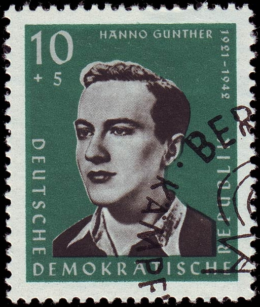 Hanno Günther (1921–1942), résistant allemand